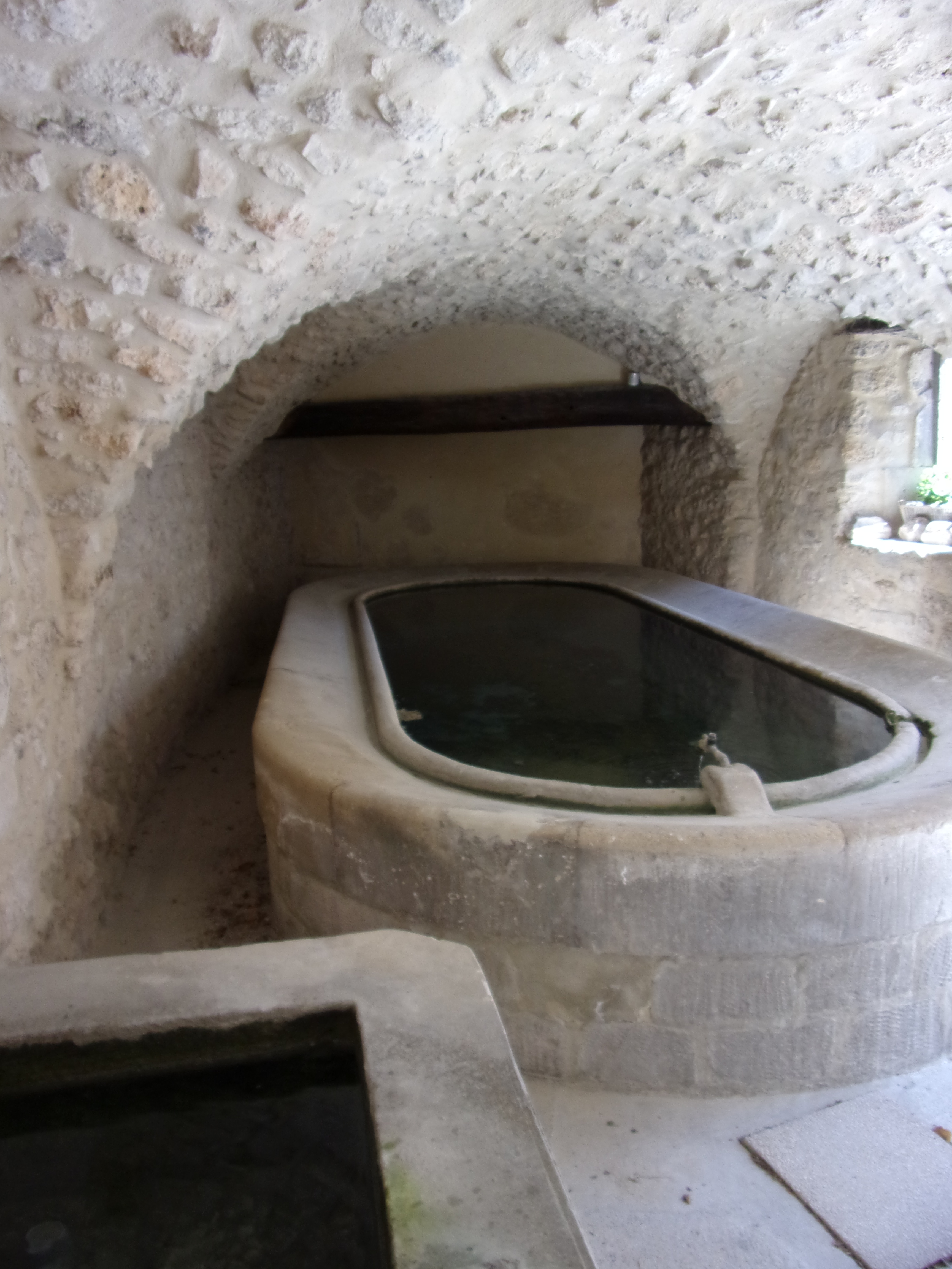 Lavoir couvert de Salles-sous-Bois